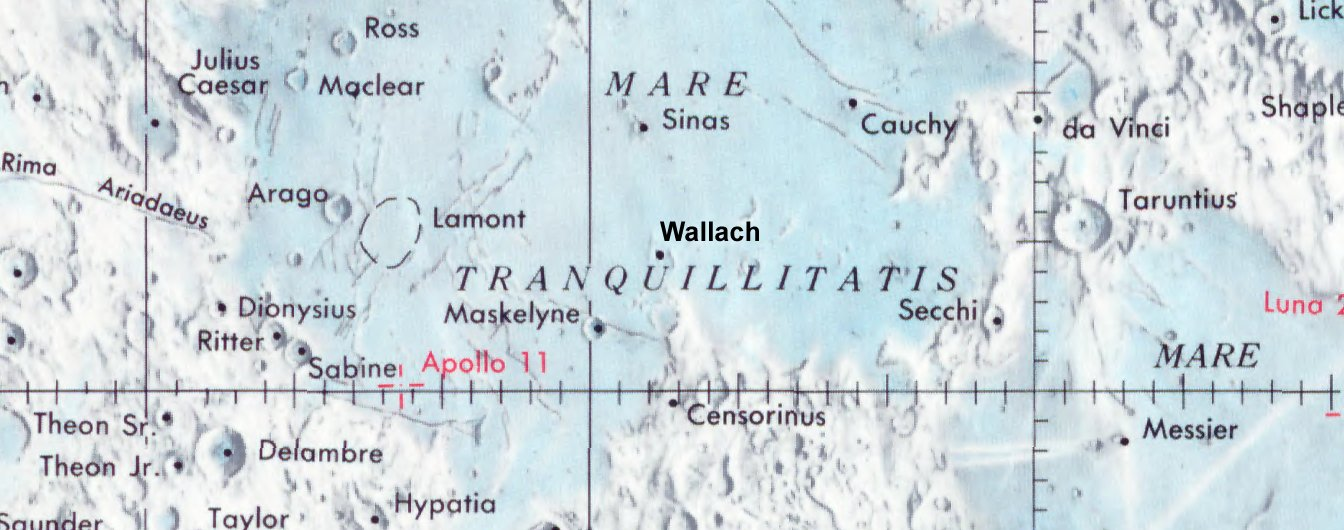 Cráter lunar . Localización. (Lunar Chart LPC1. Second Edition)